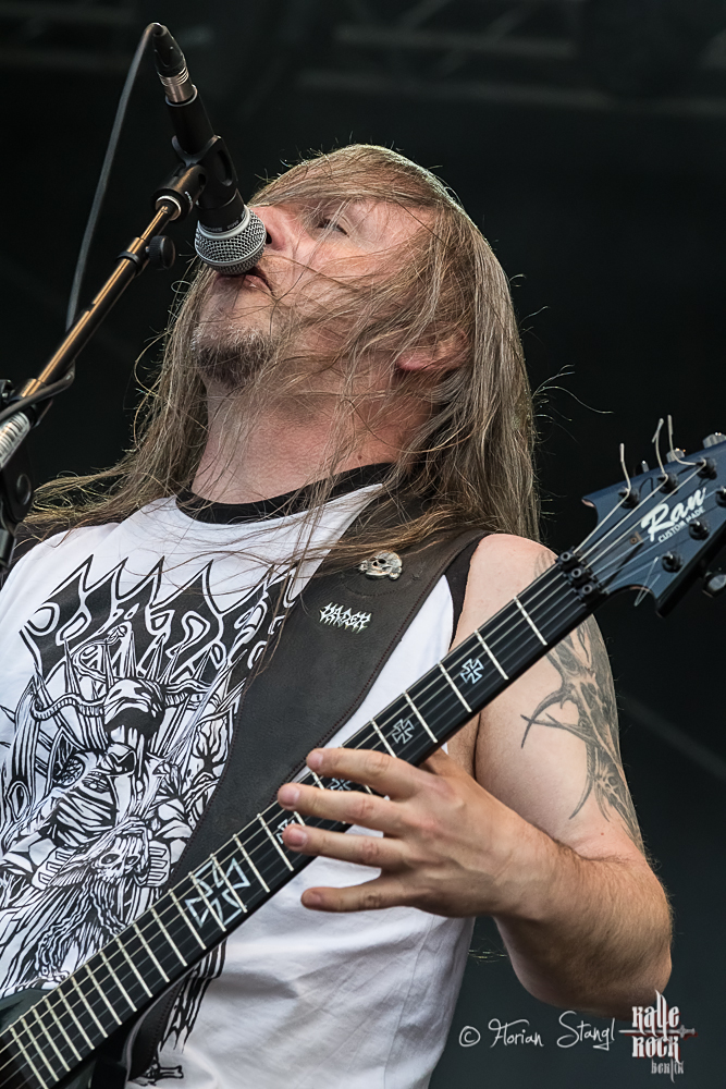 Vader - Rock Harz 2013 - 11-07-2013